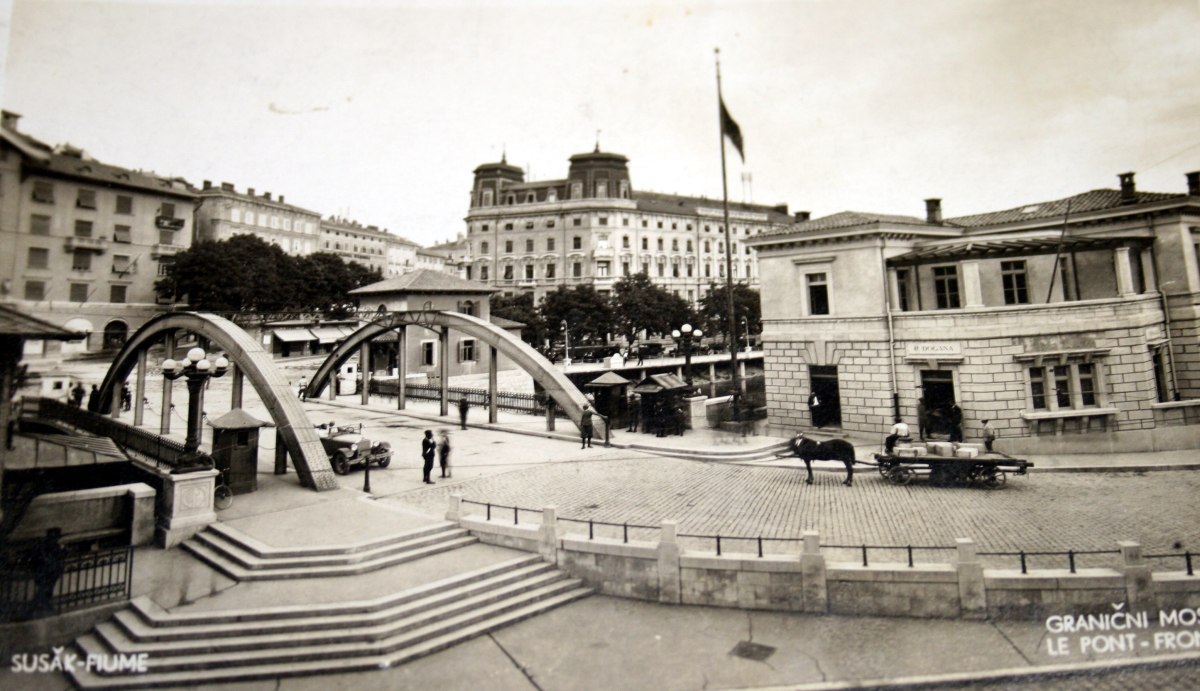 Rijeka, Granični most na Rječini 1933. godine